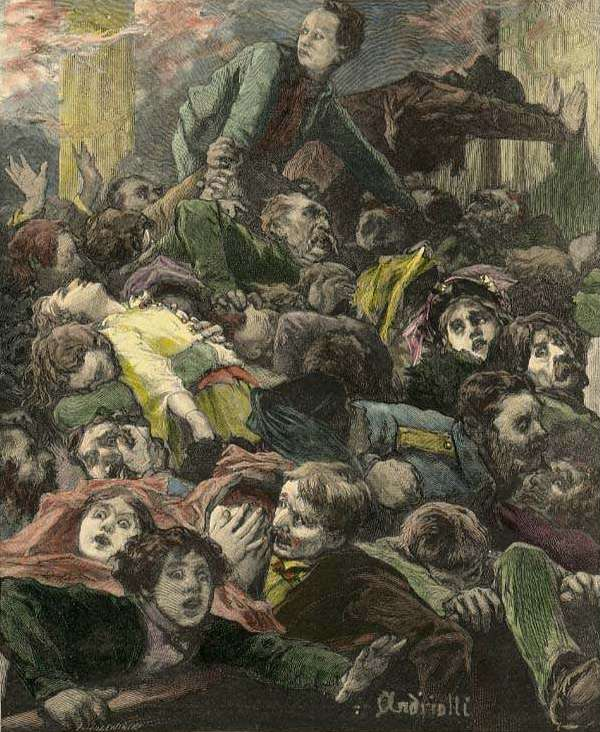 Józef Holewiński. "Scena z pożaru Cyrku w Berdyczowie. Rysował M. E. Andriolli."